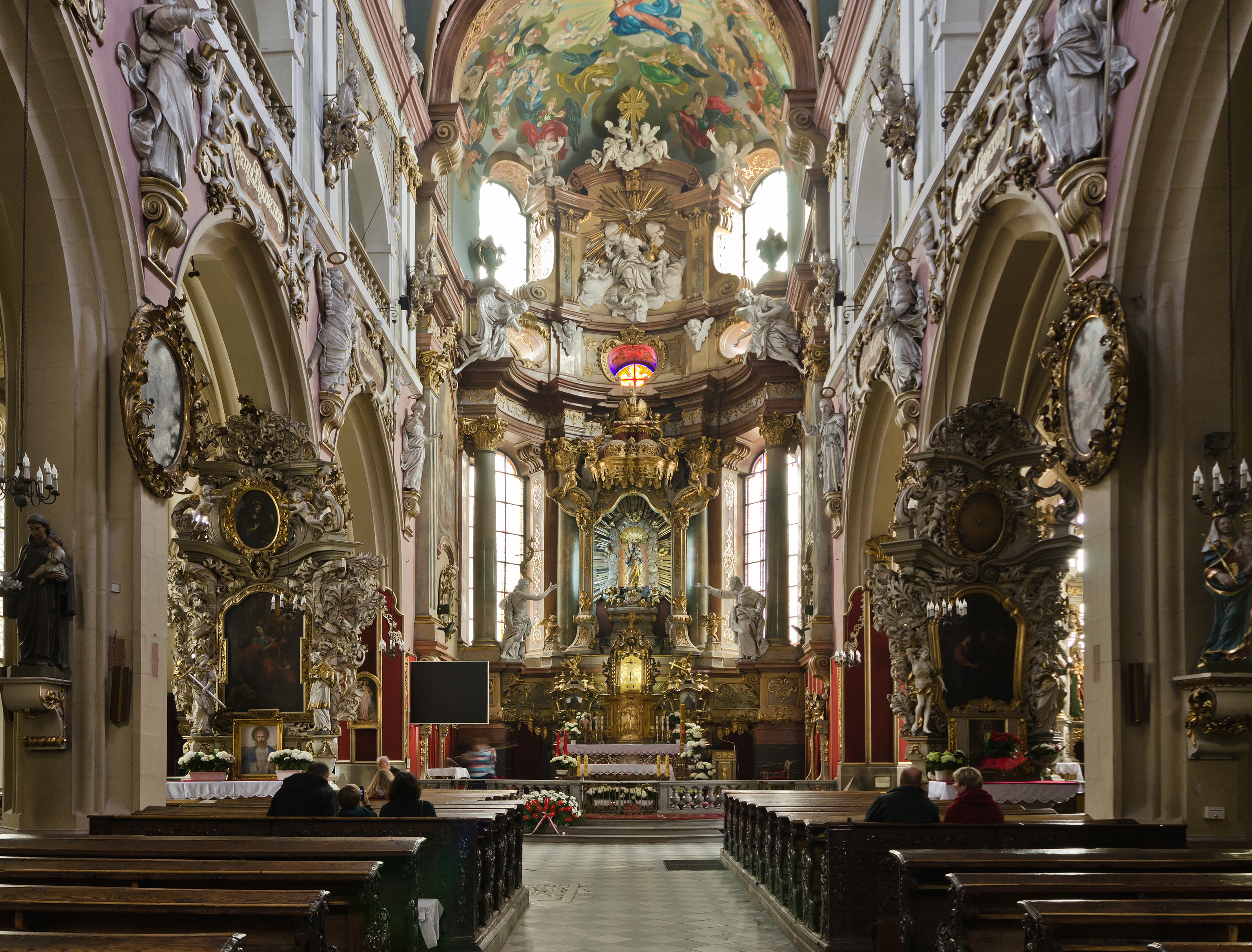 Kłodzko, kościół Joannitów, nast. Jezuitów, ob. parafialny p.w. Wniebowzięcia NMP, poł.XIV, XVI, 2 poł. XVII, XIX